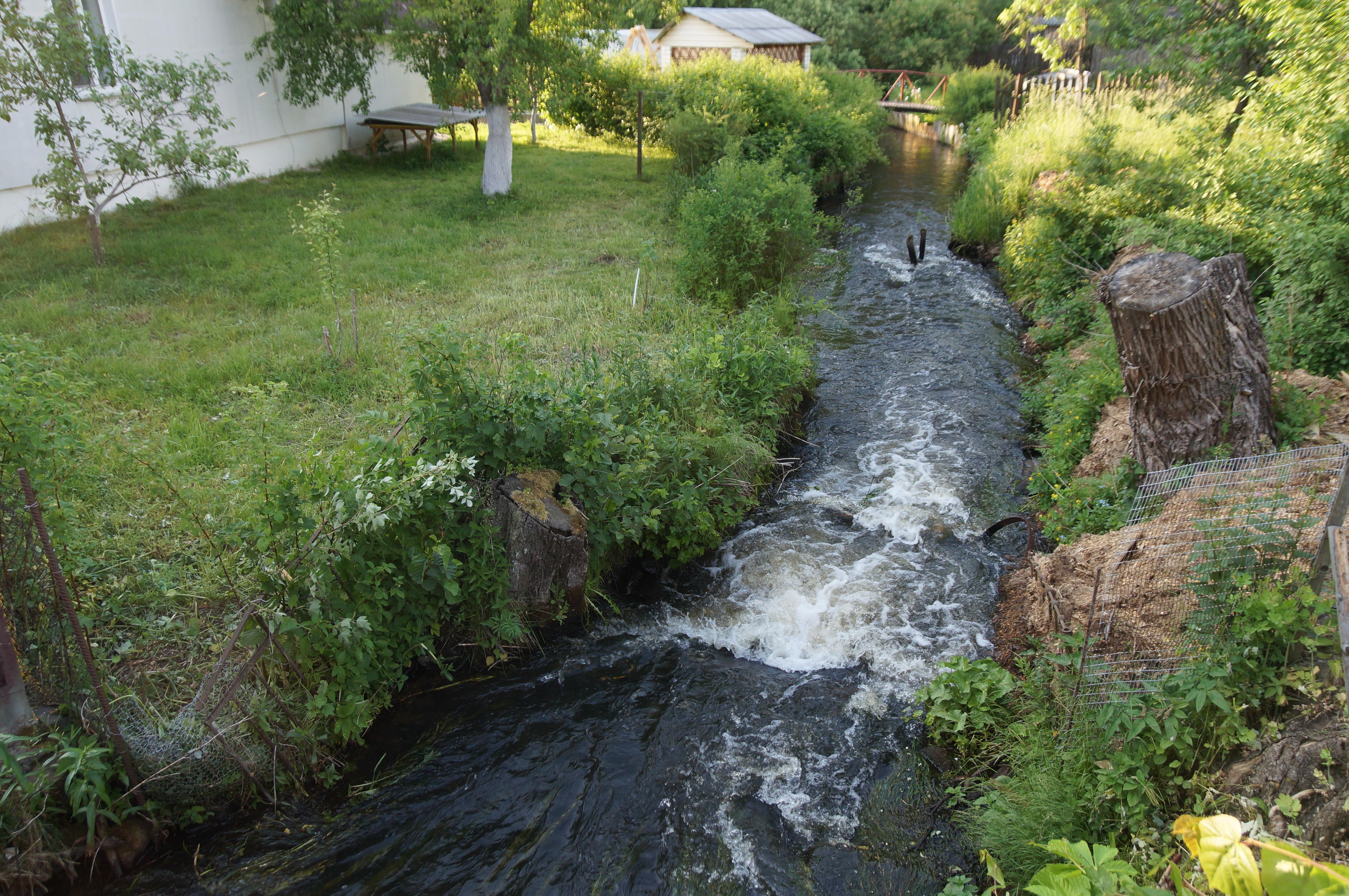 Белавароціца ў Малюнах (Стаўках)